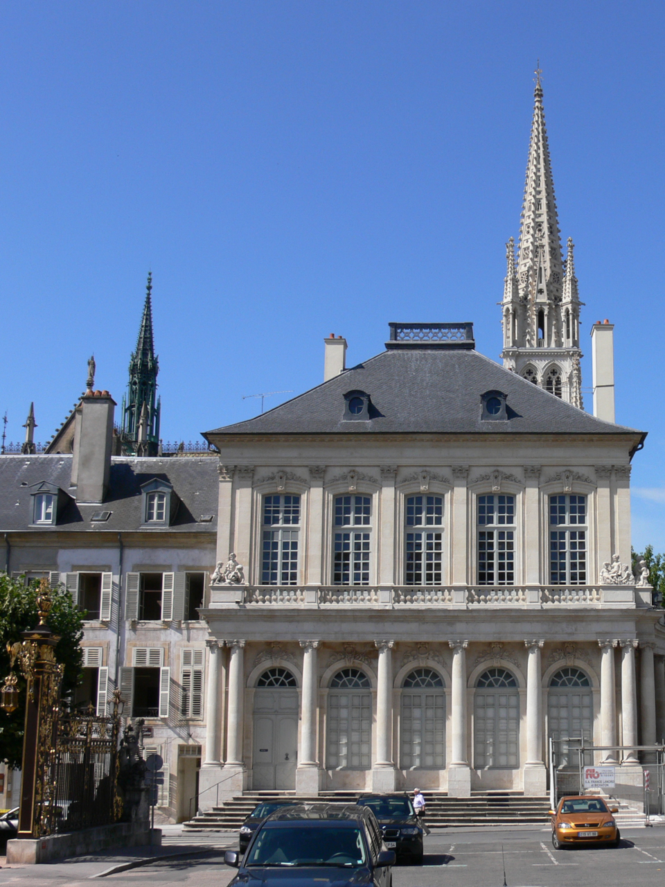 Pavillon construit au XVIII° par Émmanuel Héré, sur la place de la carrière et qui devint sa demeure urbaine.